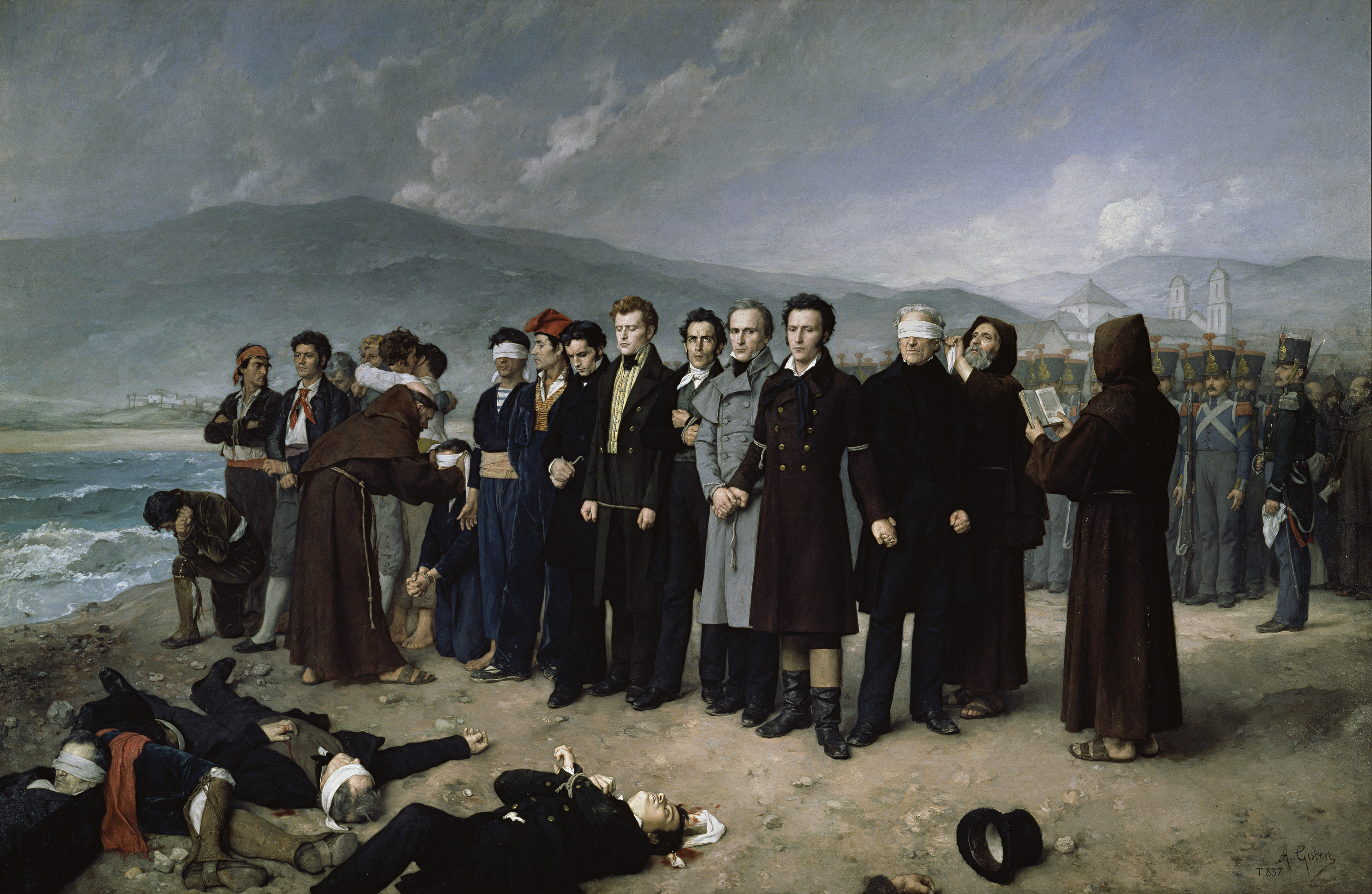 El lienzo representa el fusilamiento del general Torrijos y sus compañeros en las playas de Málaga. El general José María de Torrijos y Uriarte (1791-1831) que llegó a ser capitán general de Valencia, mariscal de campo y ministro de la Guerra durante el Trienio Liberal (1820-1823). Tras la vuelta al absolutismo, se sublevó y fue víctima de una emboscada preparada por el gobernador de Málaga, Vicente González Moreno, quien le había asegurado el triunfo de la rebelión. El día 11 de diciembre de 1831, a las once y media de la mañana, y sin juicio previo, el general Torrijos y 48 de sus compañeros fueron fusilados en las playas de Málaga. Está considerada una obra maestra de la pintura histórica del siglo XIX español y fue encargada en 1886 directamente por el Gobierno liberal de Práxedes Mateo Sagasta (1825-1903), durante la regencia de la reina María Cristina de Austria, como ejemplo de la defensa de las libertades para las futuras generaciones.